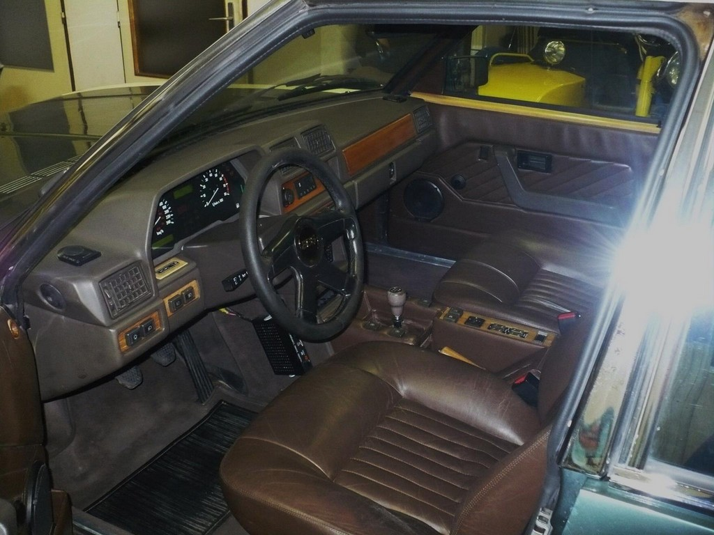 Interiér